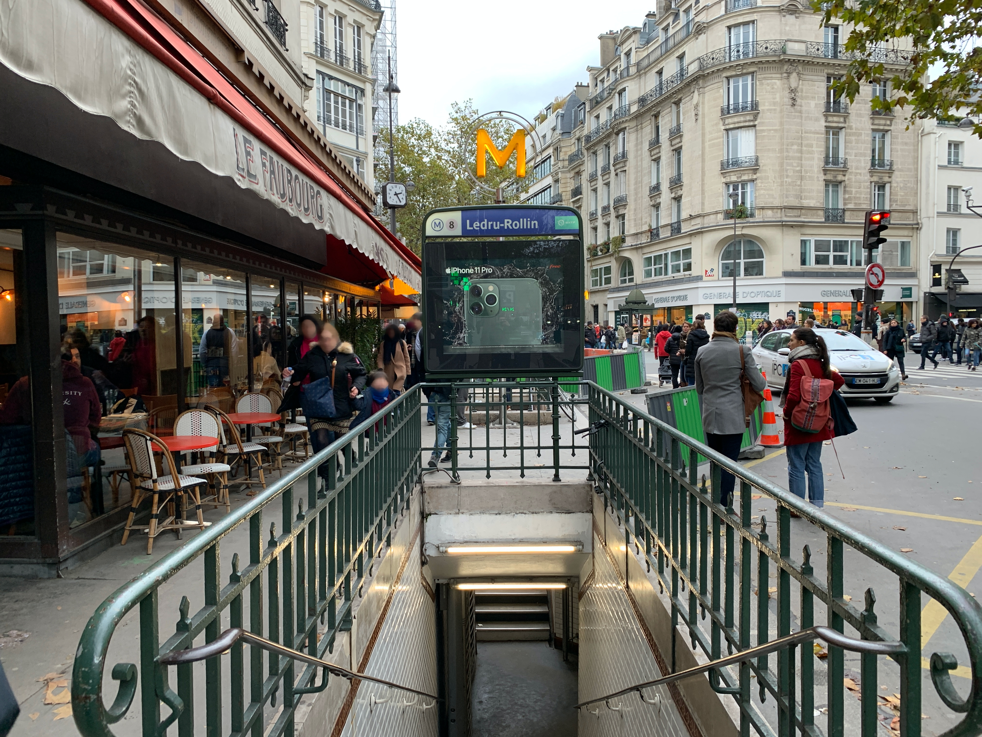 Entrée de la station de métro Ledru-Rollin, Paris.